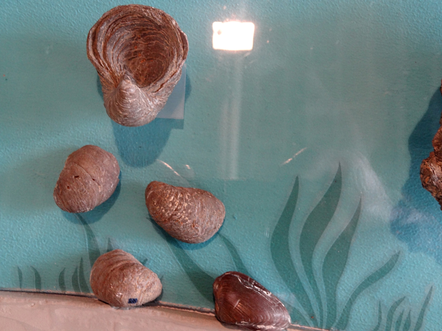 Greifmuschel Gryphea arcuata, Dioramadarstellung aus dem Schwarzen Jura der Fränkischen Alb; Fundort nahe Bad Staffelstein/Oberfranken; Exponat in der Petrefaktensammlung Kloster Banz